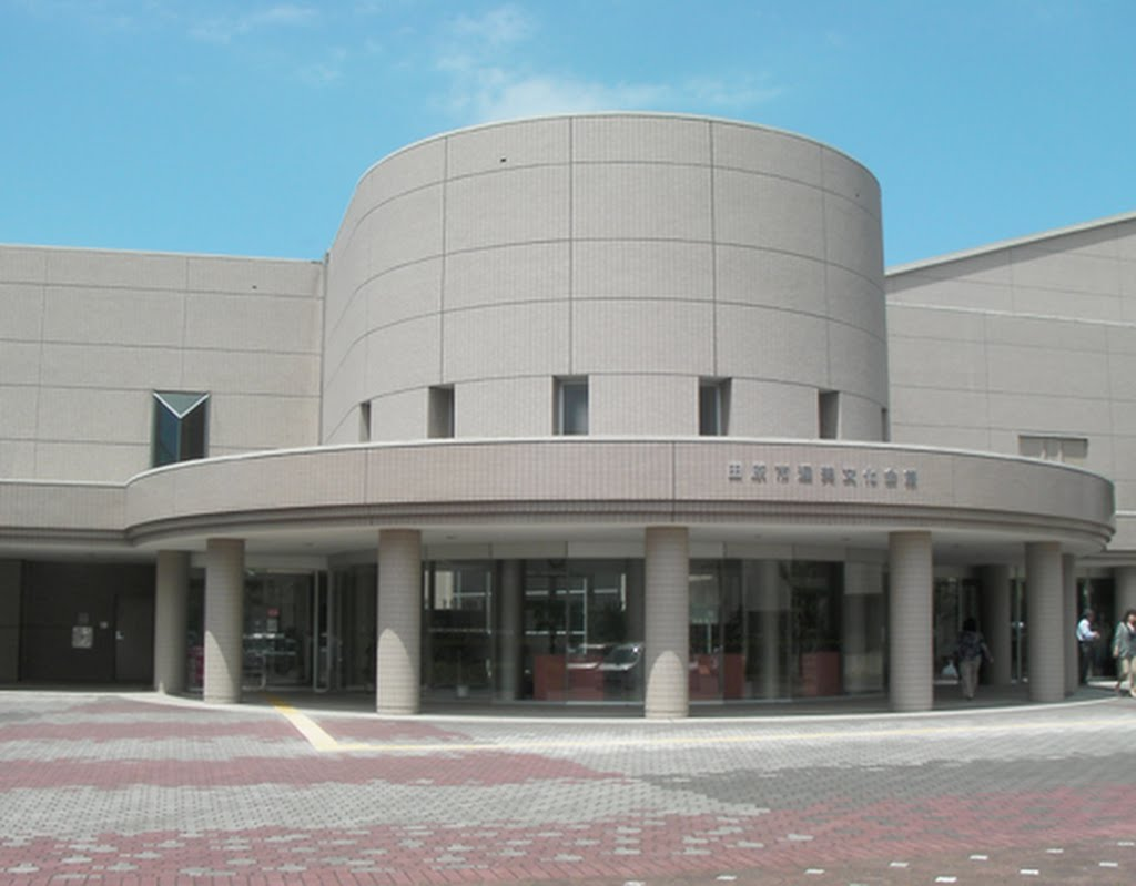 田原市渥美図書館。